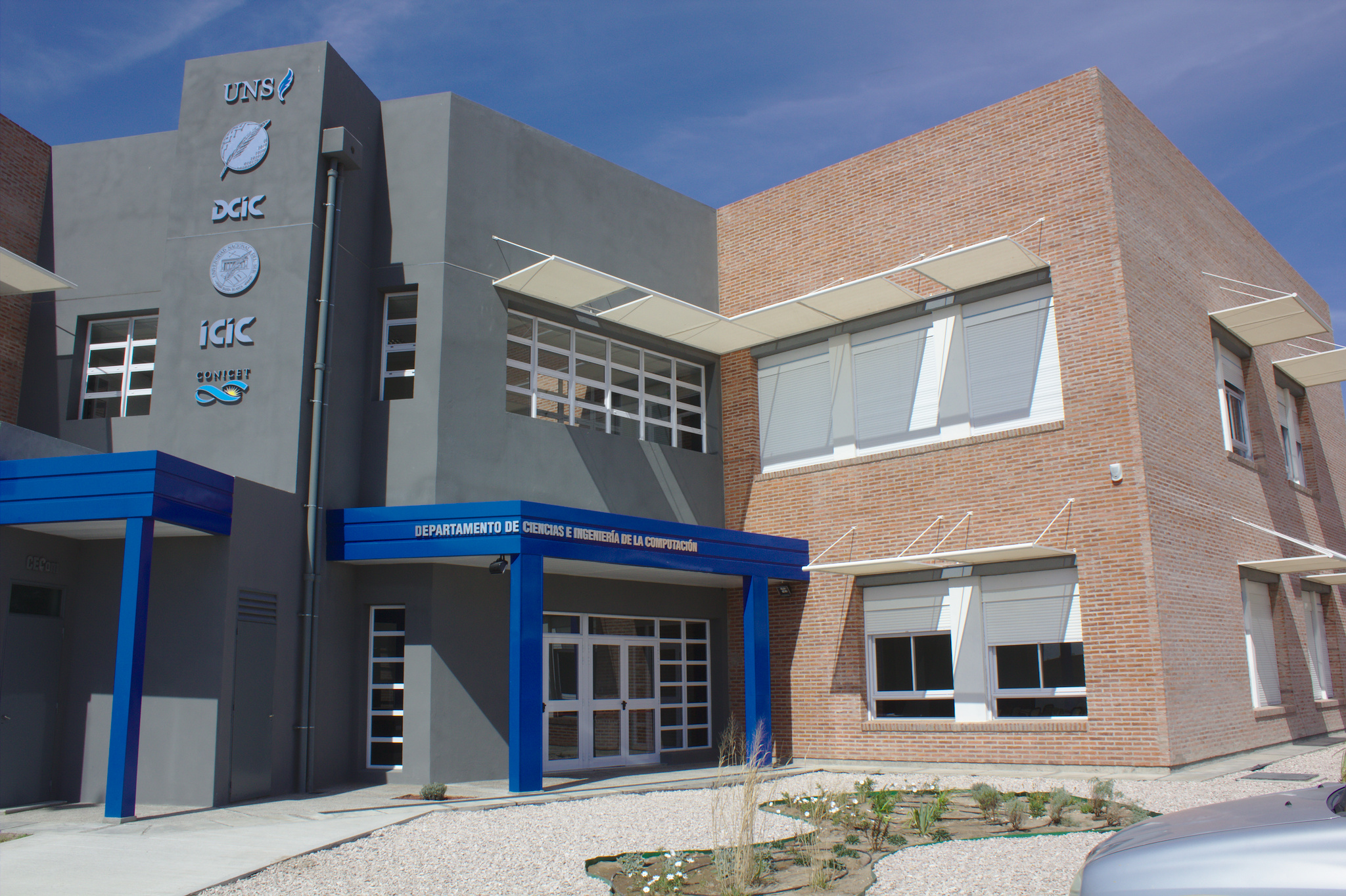 Fachada del edificio del Departamento de Ciencias e Ingeniería de la Computación en el Campus de la Universidad Nacional del Sur en el Barrio Palihue.